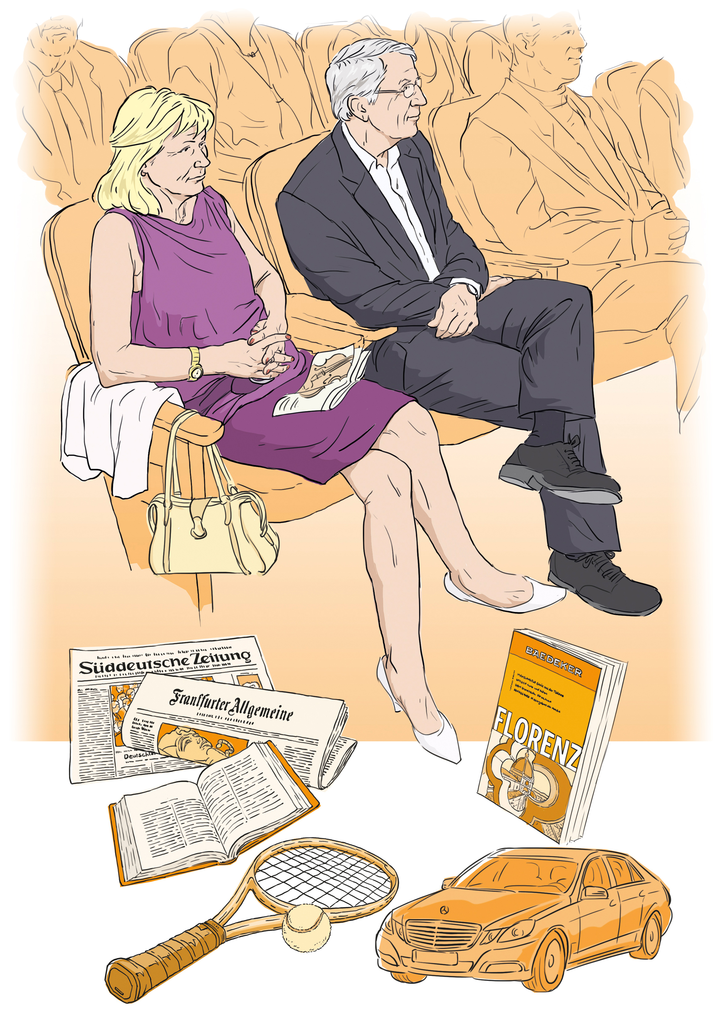 Grafische Darstellung des Typus "Hochkulturorientierte" aus der ARD-/ZDF-MedienNutzerTypologie. Beispielhafte Aussage: "Nach dem Konzert noch einen guten Rotwein."